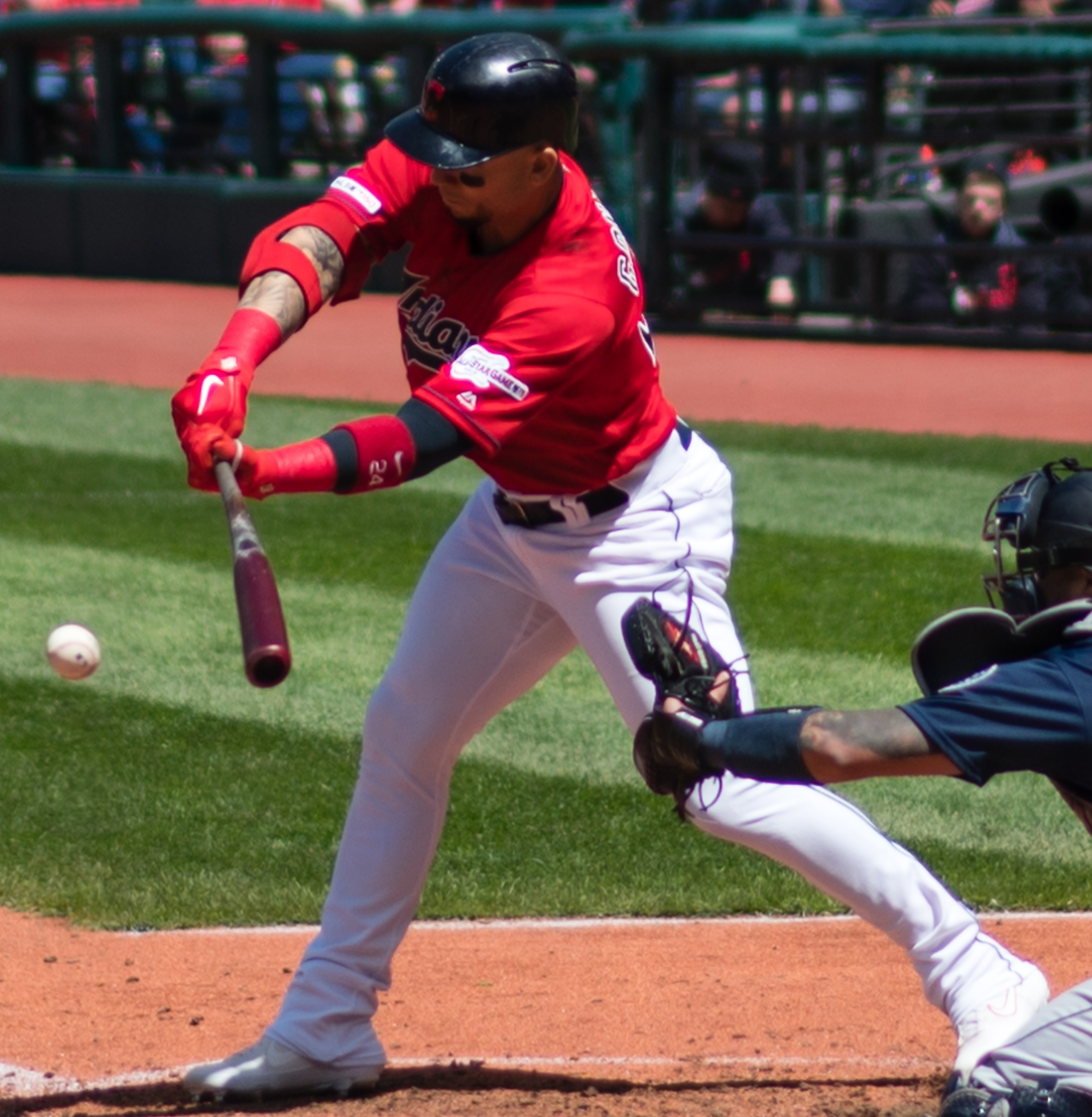 Seattle Mariners VS. Cleveland Indians